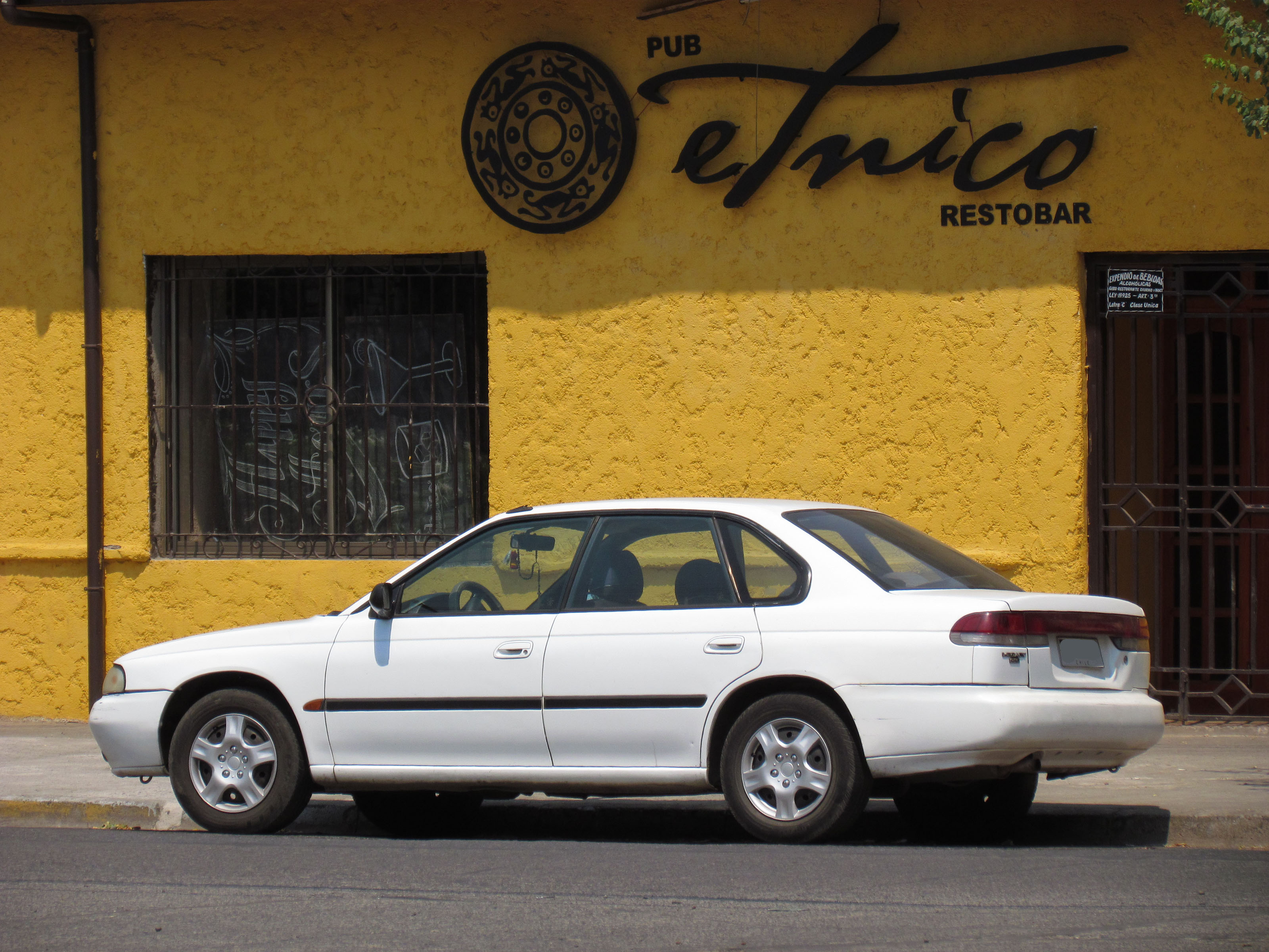 Subaru Legacy 2.0 GL 1996